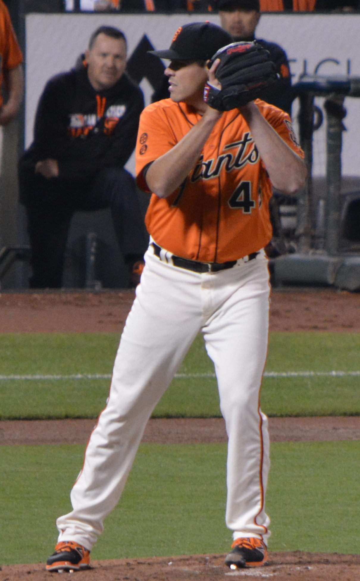 Matt Moore